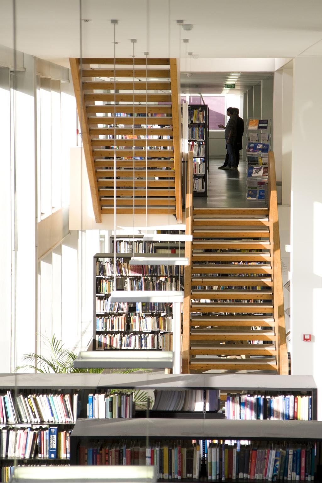 Photo de la BCX (Bibliothèque centrale de l'École polytechnique) et du centre de ressources historiques